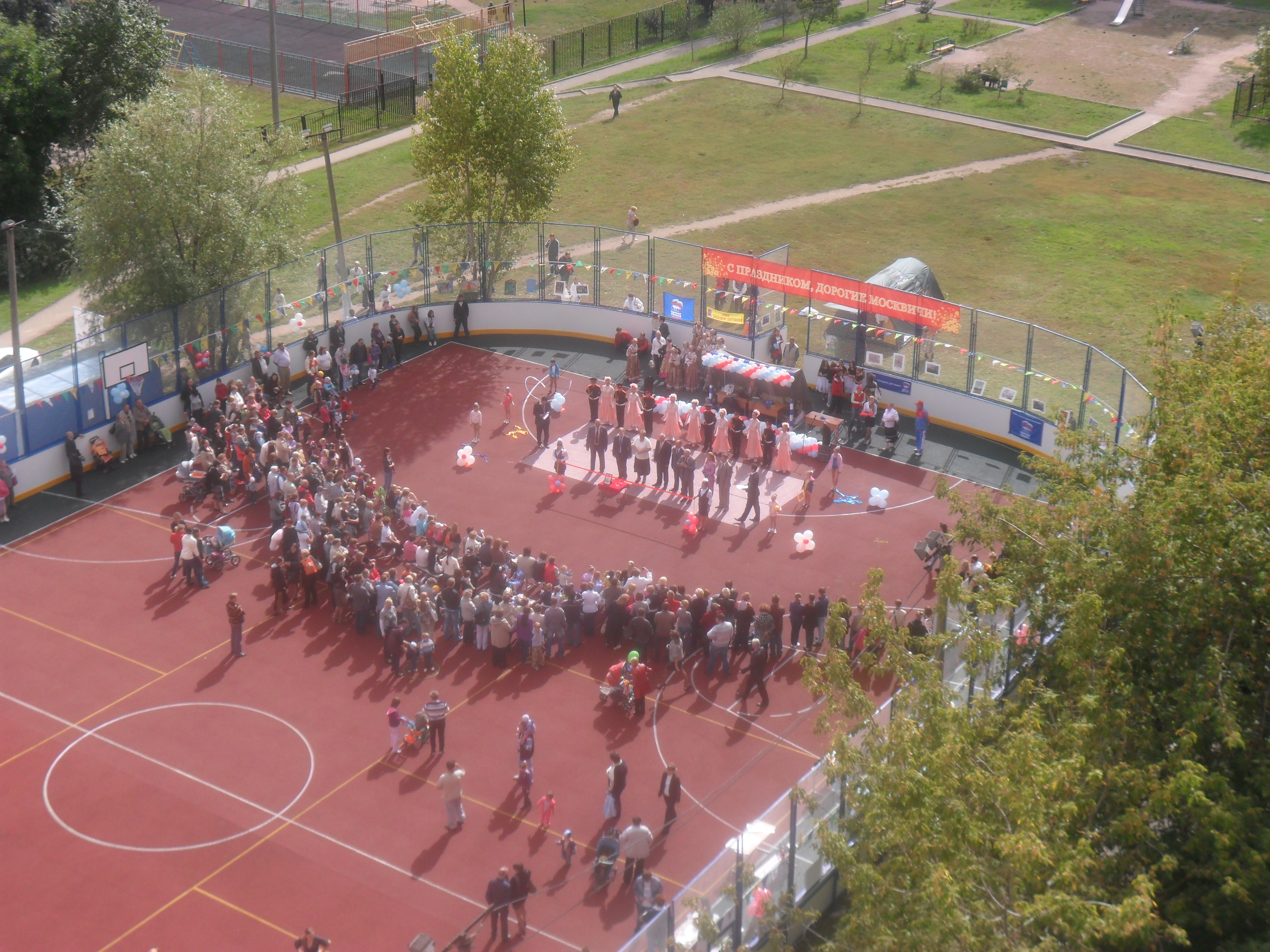 День города-2011 в микрорайоне Бусиново САО города Москвы. Торжественное открытие спортивной площадки.